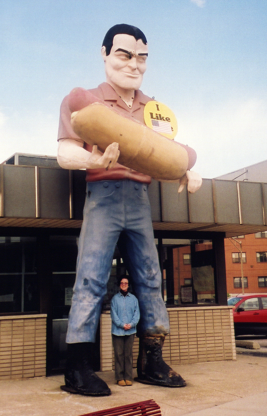 A Muffler Man holding a hot dog.